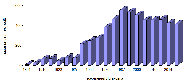 Луганська популяція людей за 150 років (версія 2017-11-19). Зміни людності за різними джерелами